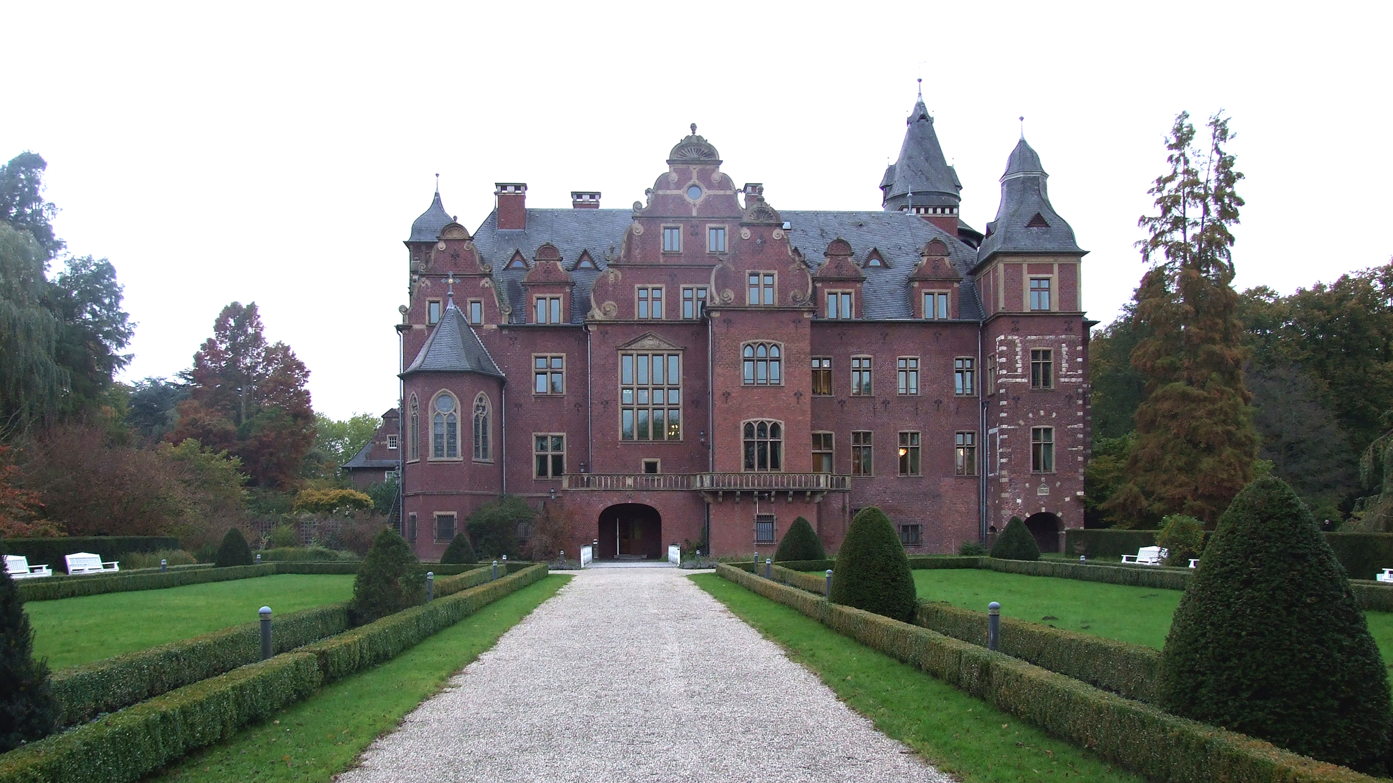 Schloss Krickenbeck - Blick vom Park This image shows a heritage building in Germany, located in the North Rhine-Westphalian city Nettetal (no. 31).